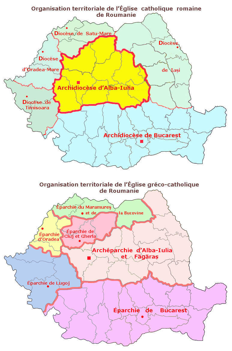 Carte des Diocèses et éparchies catholiques en Roumanie